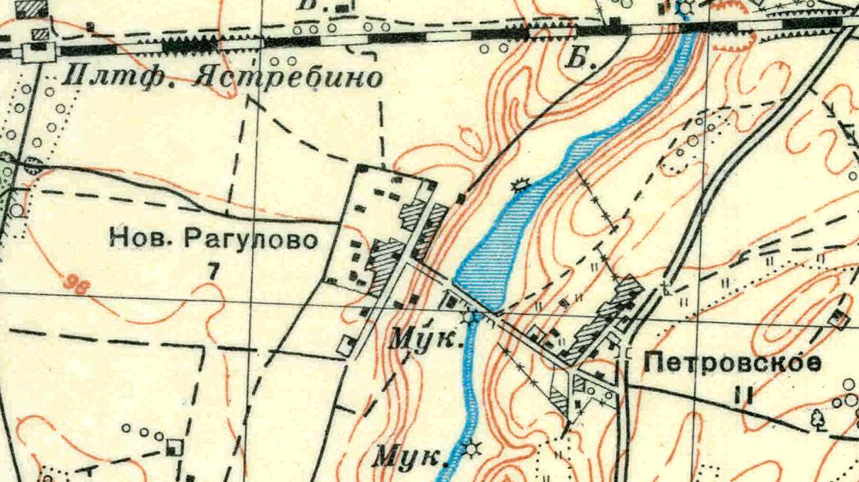 Топографическая карта Ленинградской области, квадрат О-35-22-Г-г (Торма), деревня Рагулово.